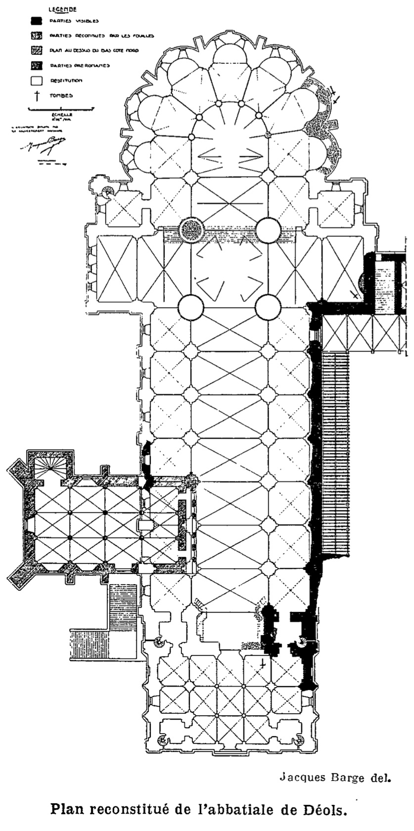 Abbaye de Déols, reconstitution de l'abbatiale